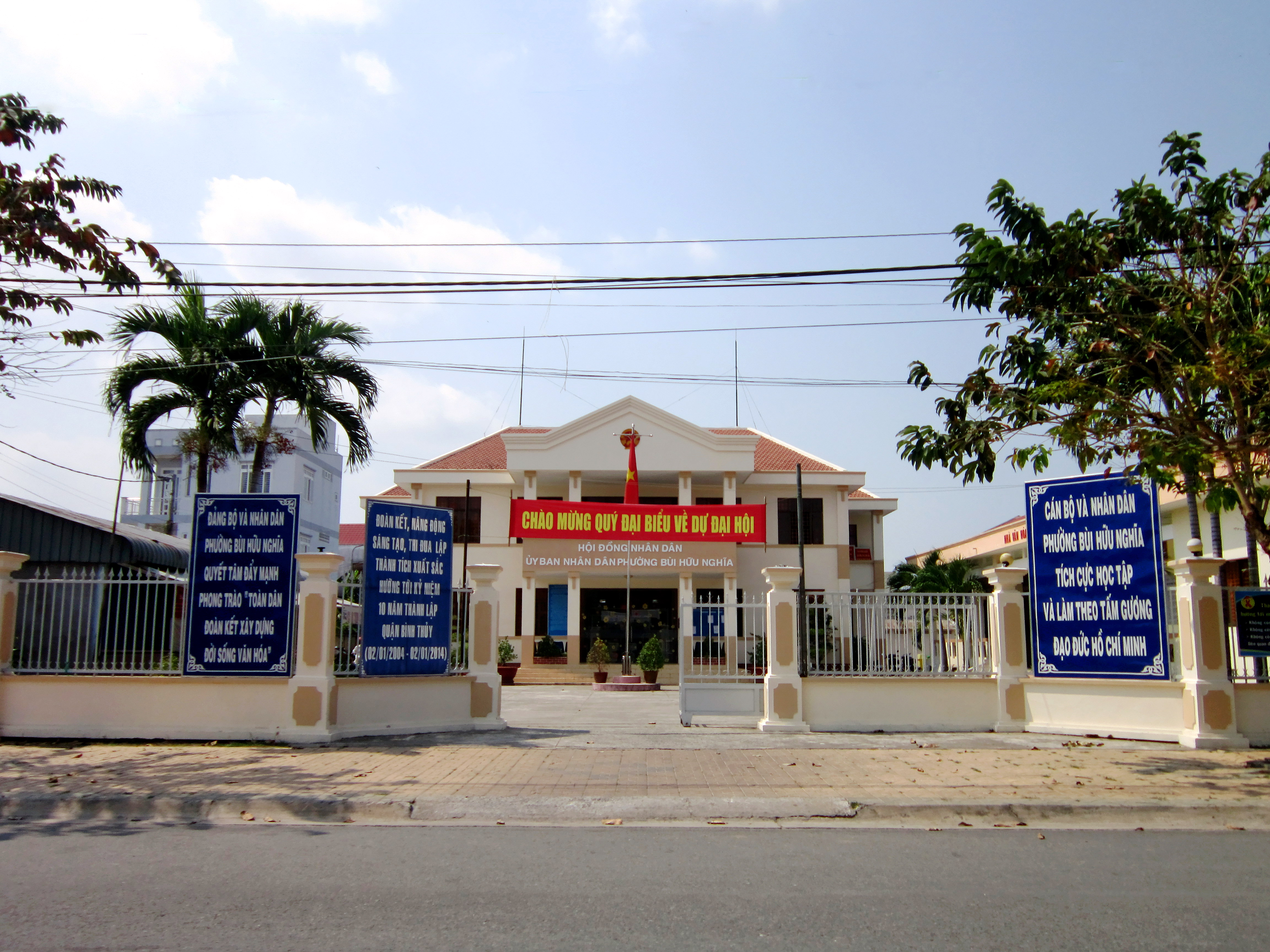 Trụ sở Ủy ban Nhân dân phường Bùi Hữu Nghĩa ở TP. Cần Thơ, Việt Nam.